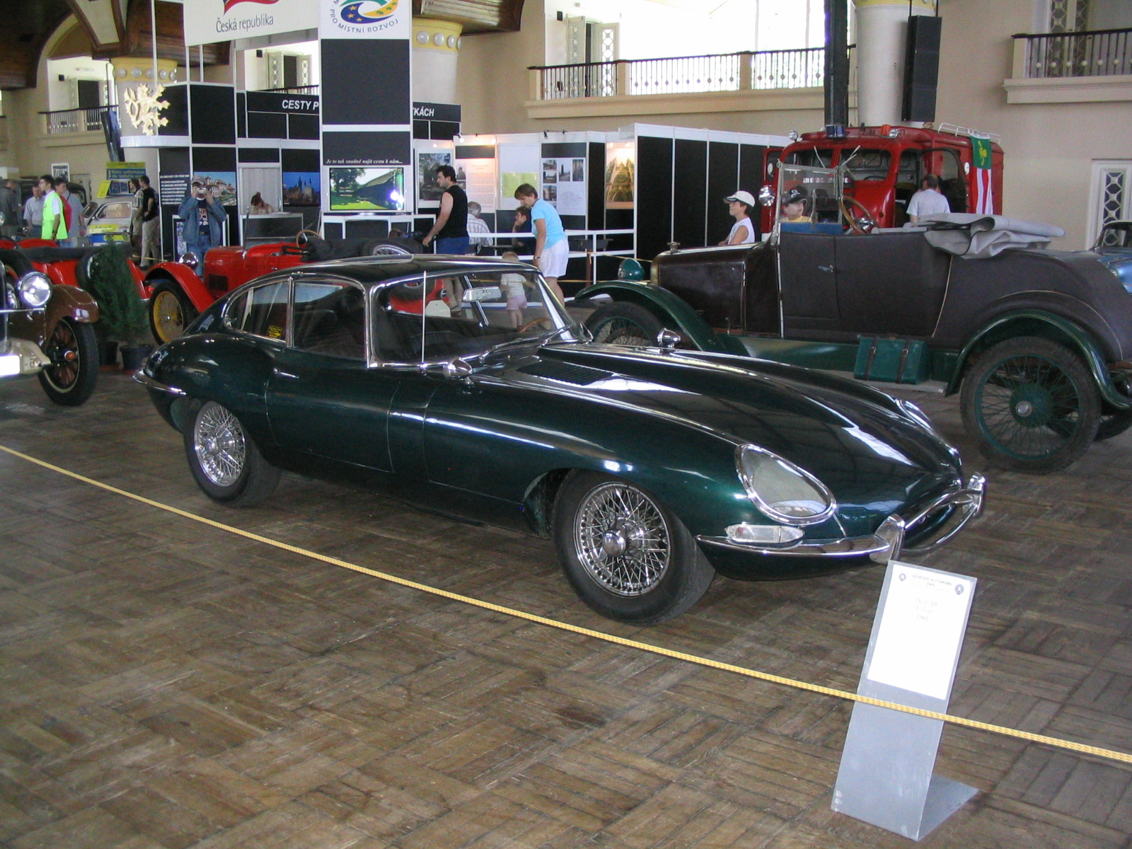 Jaguar E-type coupe 1. série, Veteran Motor Show Praha